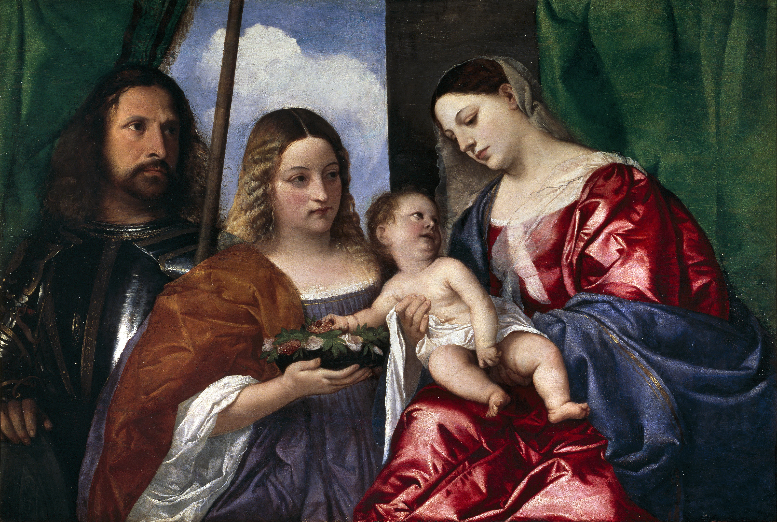 La obra representa a la Virgen María llevando al Niño Jesús y acompañada por San Jorge y por Santa Dorotea.